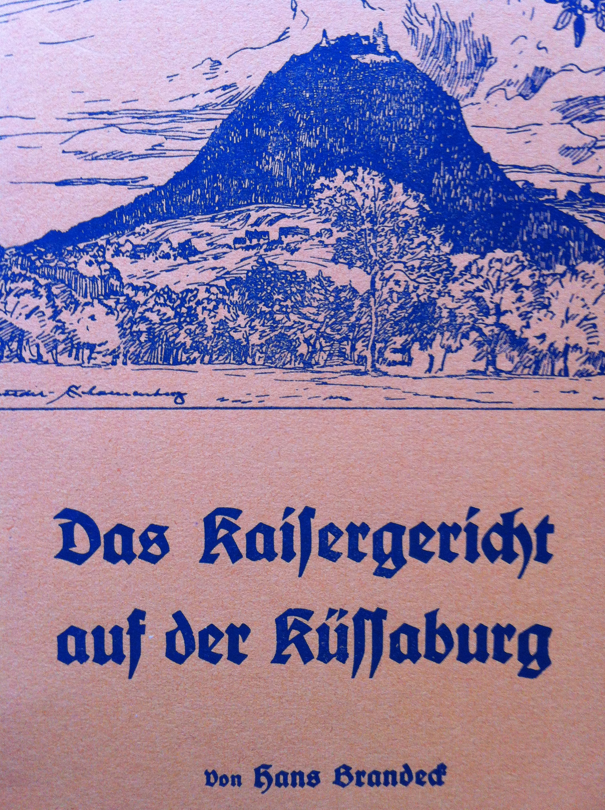 Umschlagseite des Textbuches Das Kaisergericht auf der Küssaburg. für ein „Historisches Heimatspiel in 3 Akten aus der Geschichte des Klettgaus [... zu einer] Freilichtaufführung anläßlich der 300jähr. Wiederkehr der Zerstörung der Küssaburg 1634/1934.“ Das Stück spielt zur Zeit Kaiser Rudolfs II. im Jahre 1602. (Zeichner ungenannt).